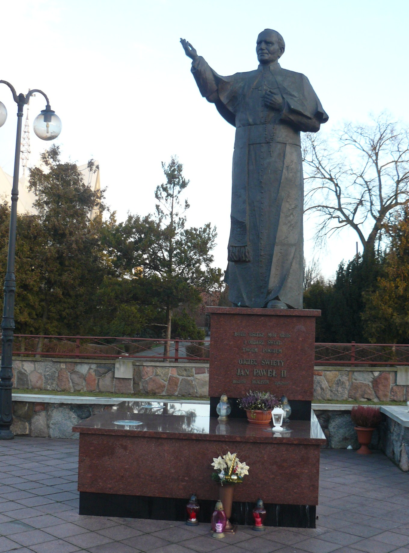 Kościół NMP Matki Kościoła w Gostyninie.